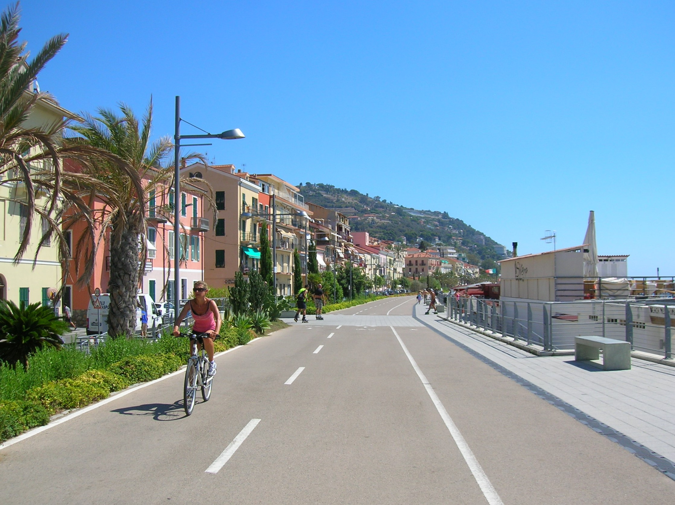 Pista ciclabile del Ponente ligure o "passeggiata Sandro Pertini" pista ciclabile e pedonale a Ospedaletti, Liguria, Italia.